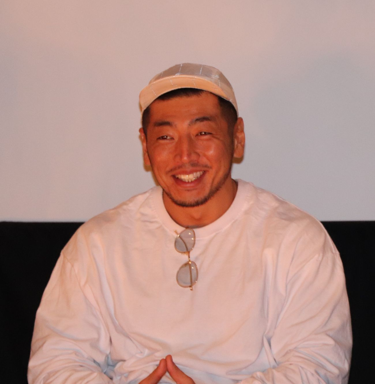 横浜光音座「強がりカポナータ」舞台あいさつ（2020年1月）後藤剛範